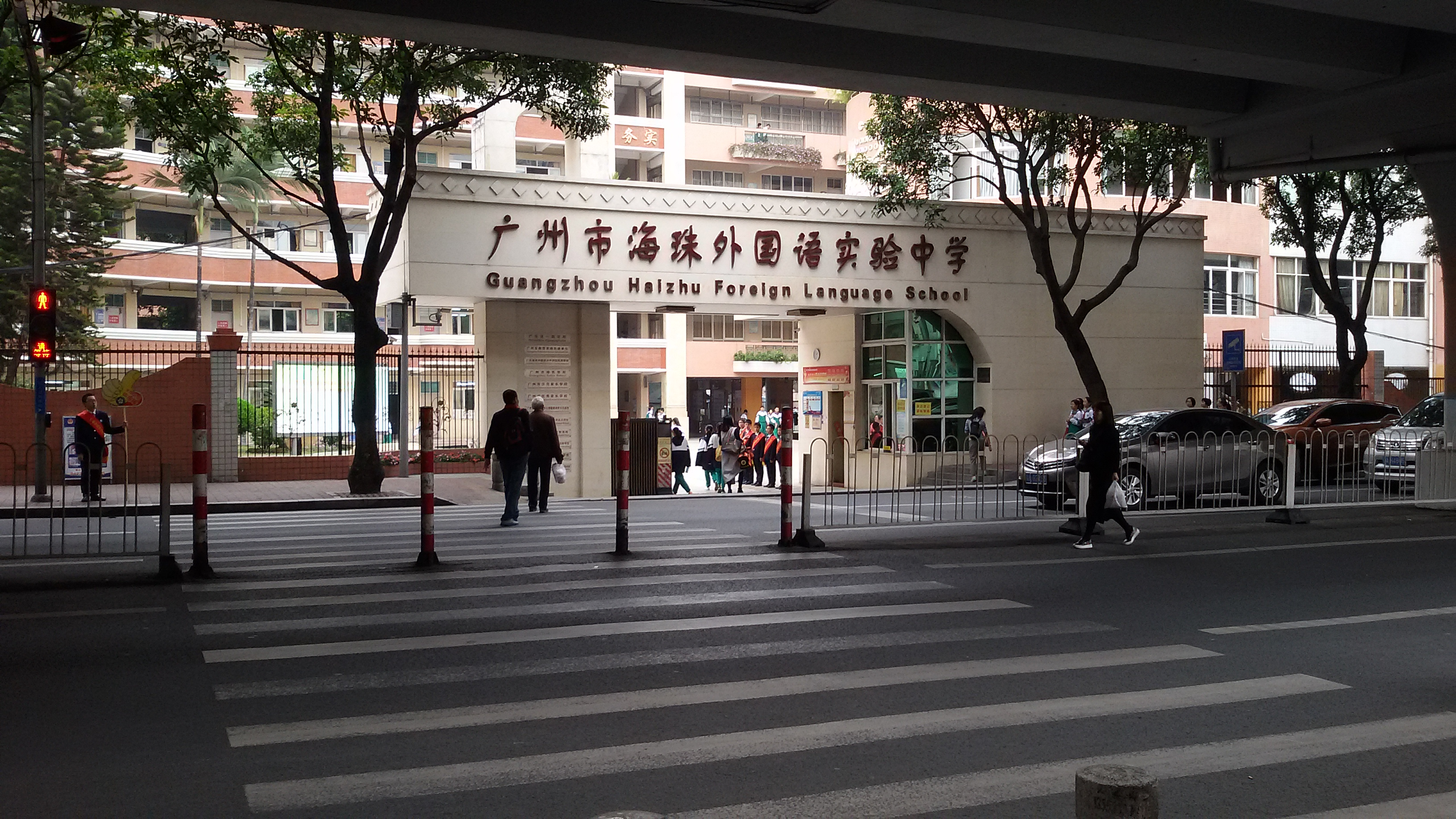 粵語: 海珠區外國語實驗學校正門